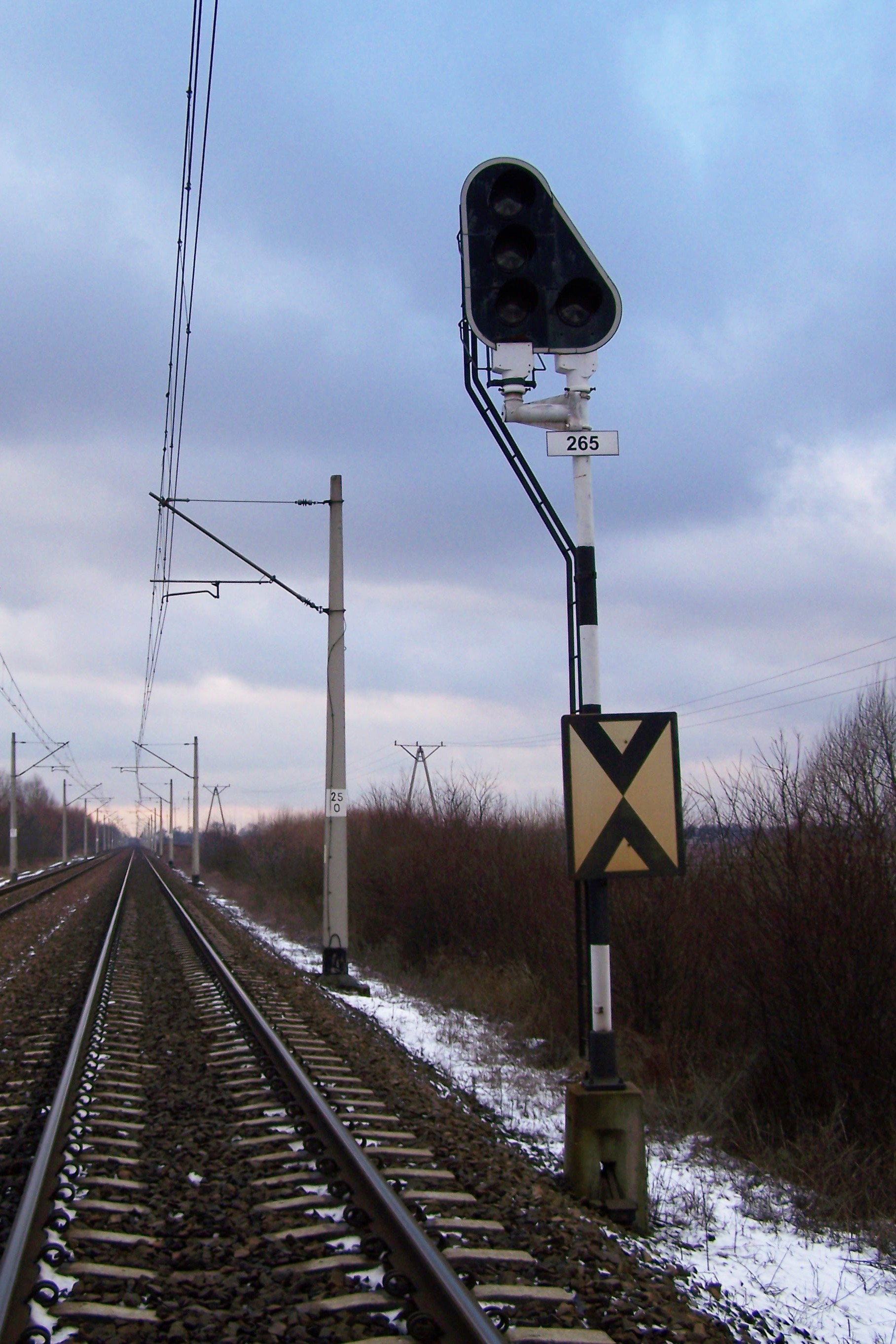 Tarcza ostrzegawcza przejazdowa. Linia kolejowa nr 3. Szlak Płochocin - Błonie.